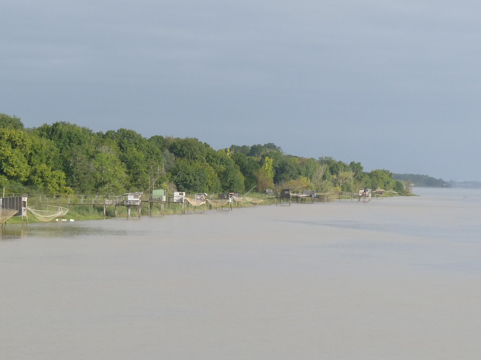 Estuaire de la Gironde (vue vers l'aval et rive gauche), Lamarque, Gironde, France